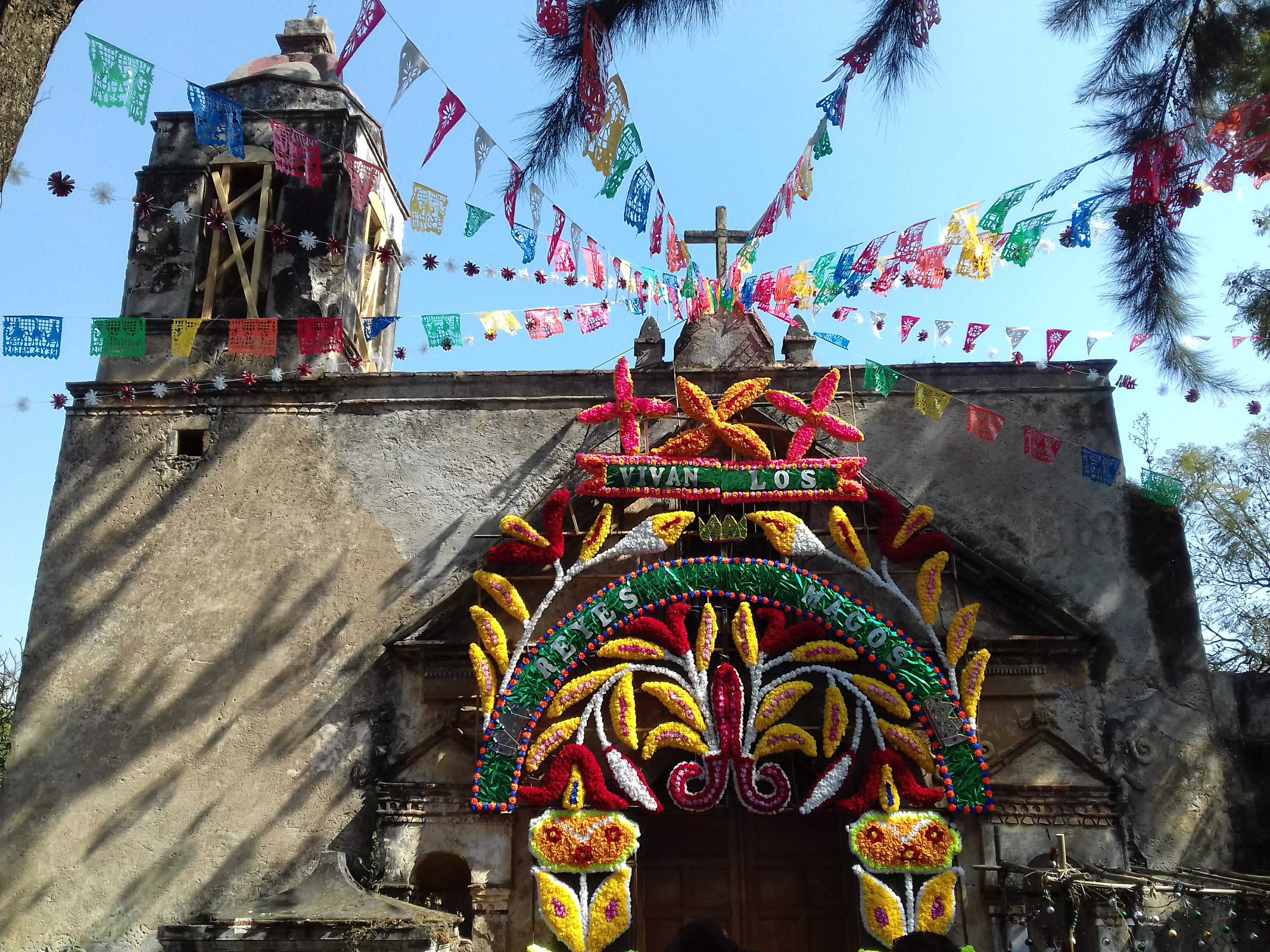 Capilla de los reyes durante su fiesta patronal